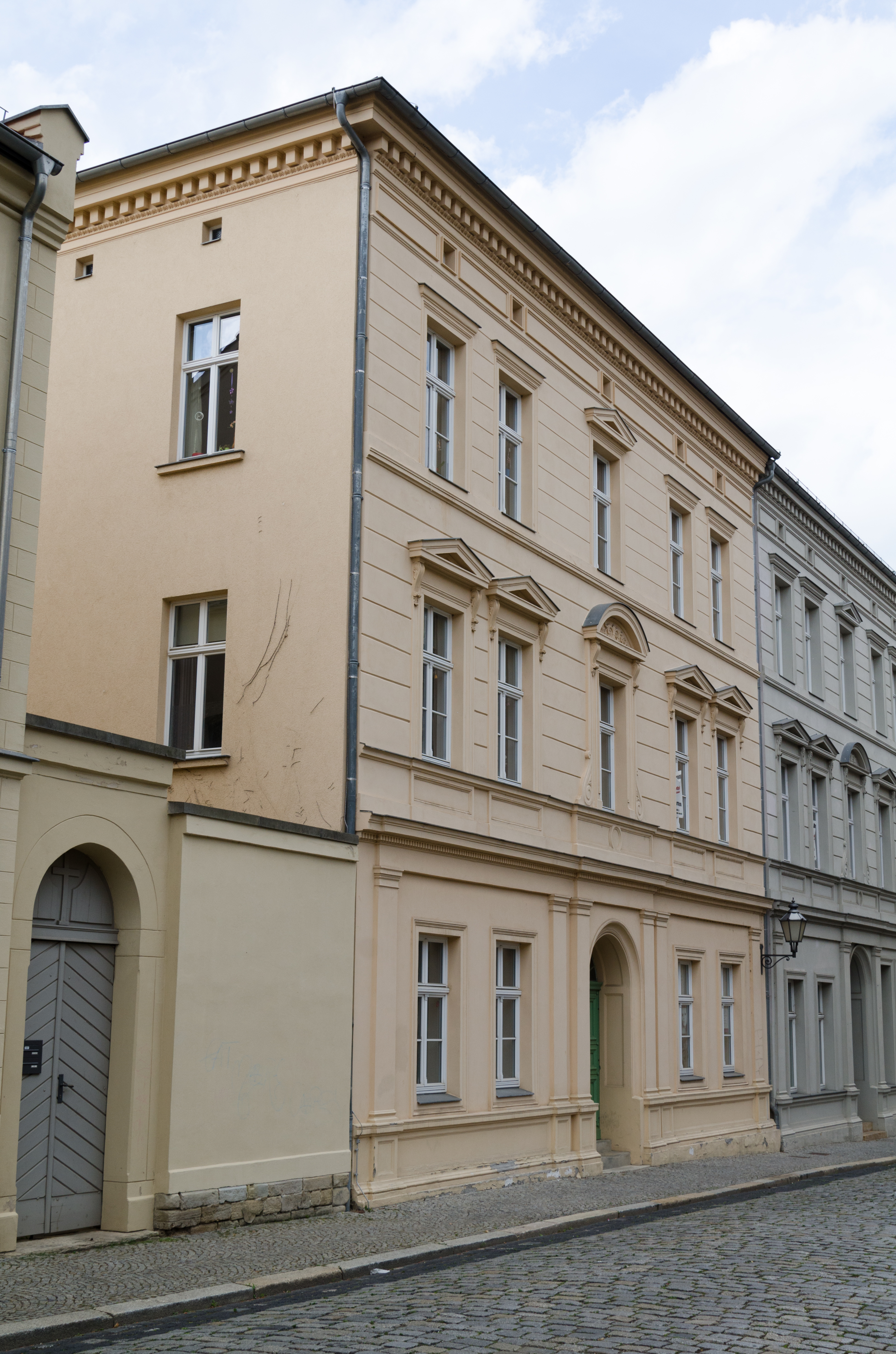 Zeitz, Schulstraße 2